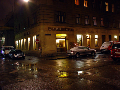 Sperlgasse im Wiener Karmeliterviertel